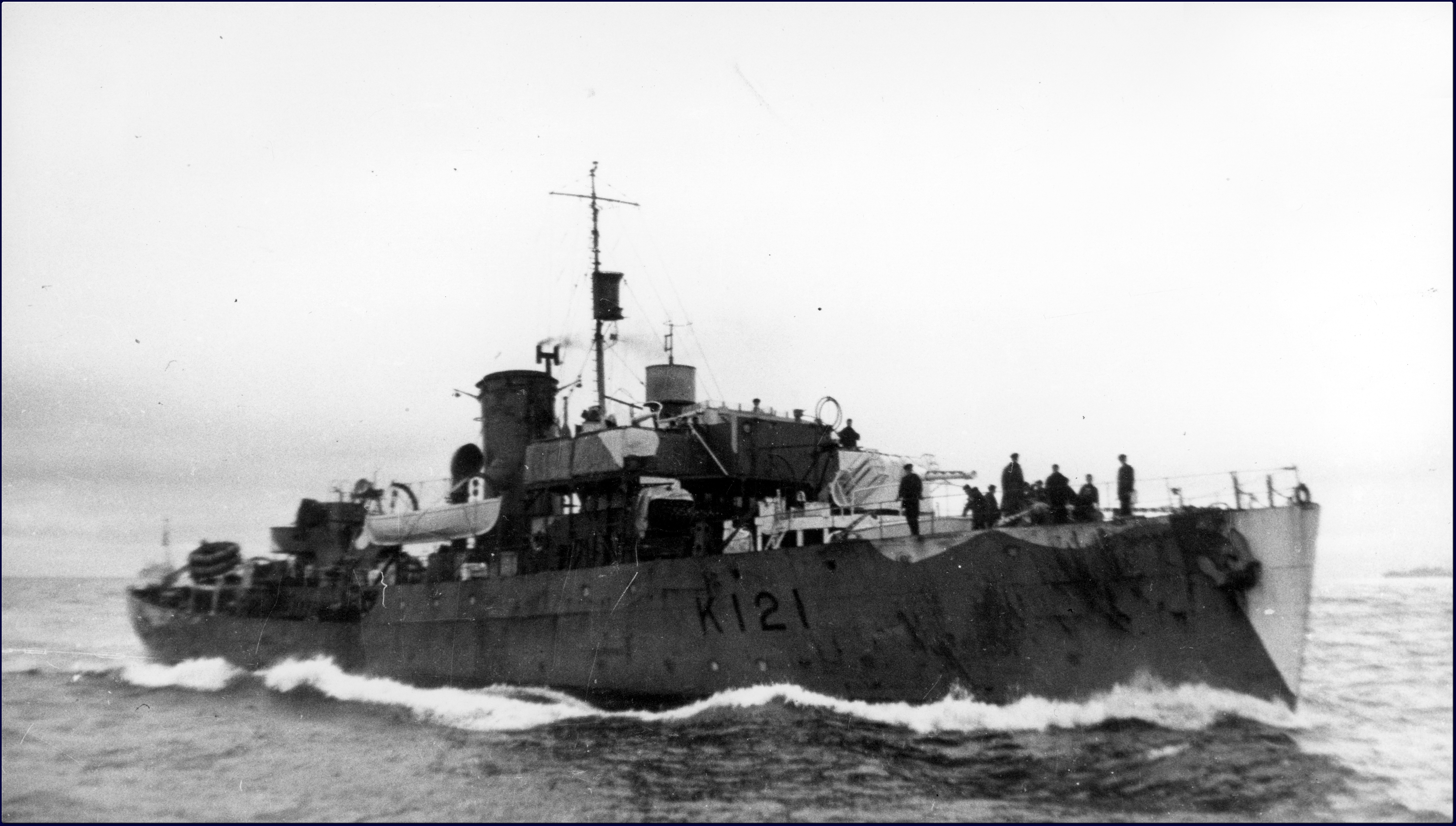 HMCS Rimouski, circa 1944 - 1945